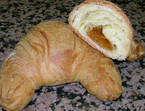 Cornetti, croissant, brioches